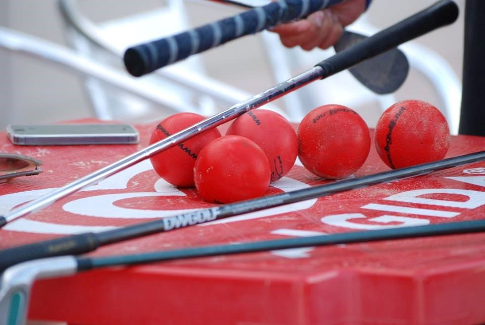 Stapovi i loptice za Beach golf